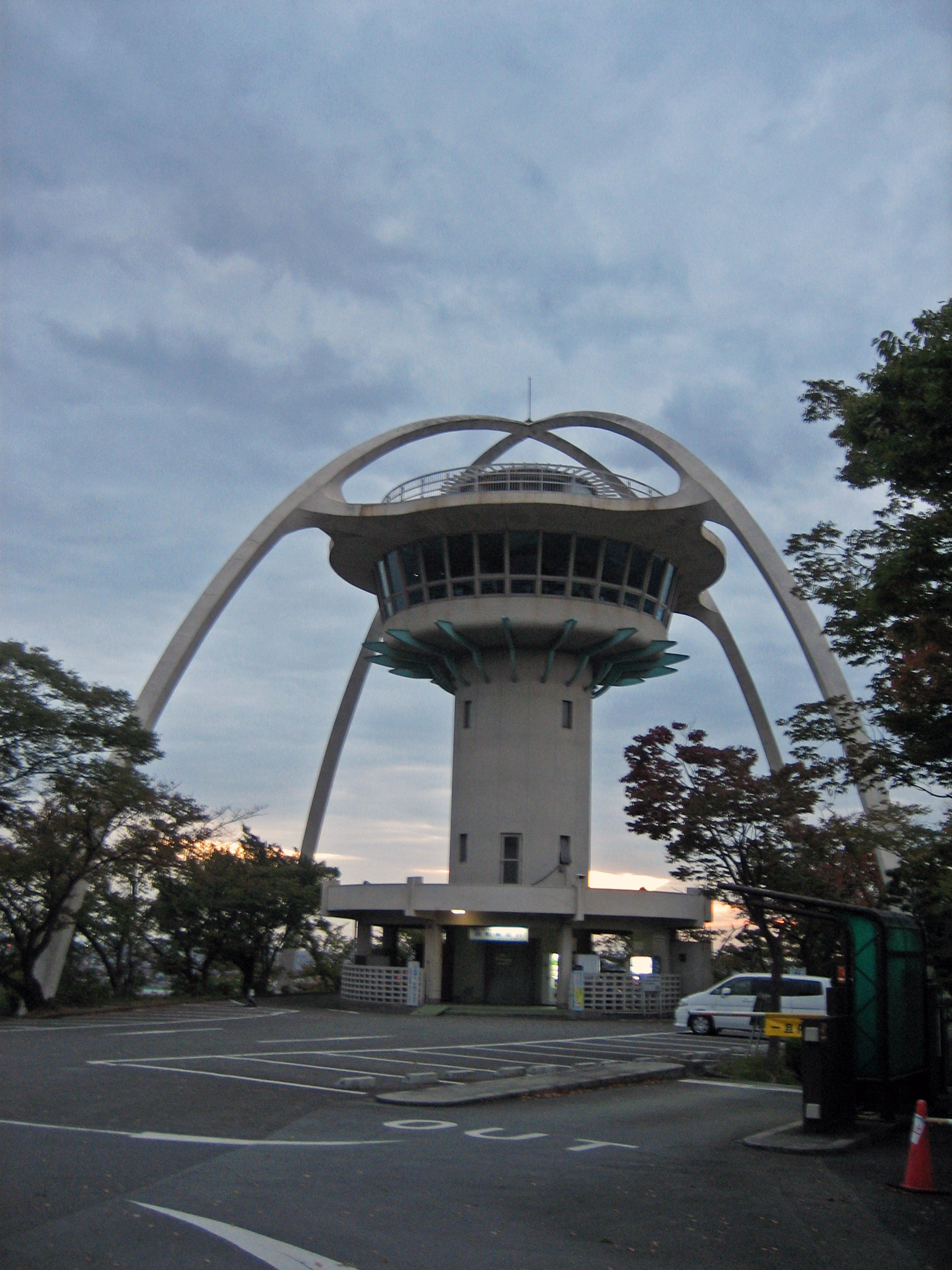 手柄山の回転式展望台近影。北側より撮影。